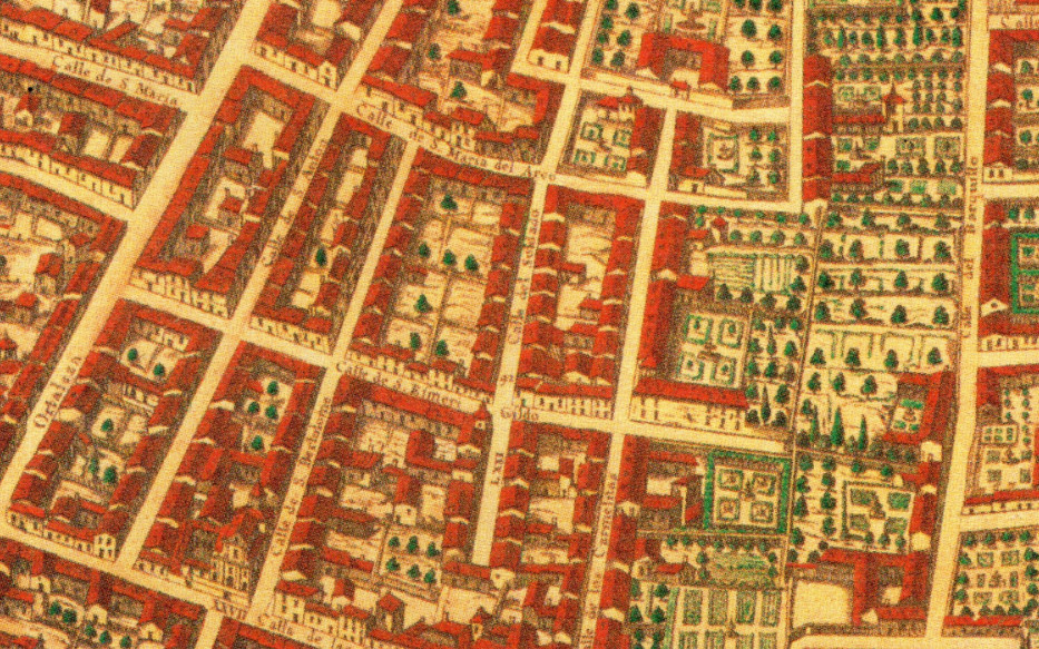 Detalle de la Topografía de la Villa de Madrid descrita por Don Pedro Texeira en 1656. Em el centro, la antigua calle del Soldado, luego calle de Barbieri, a partir de 1894